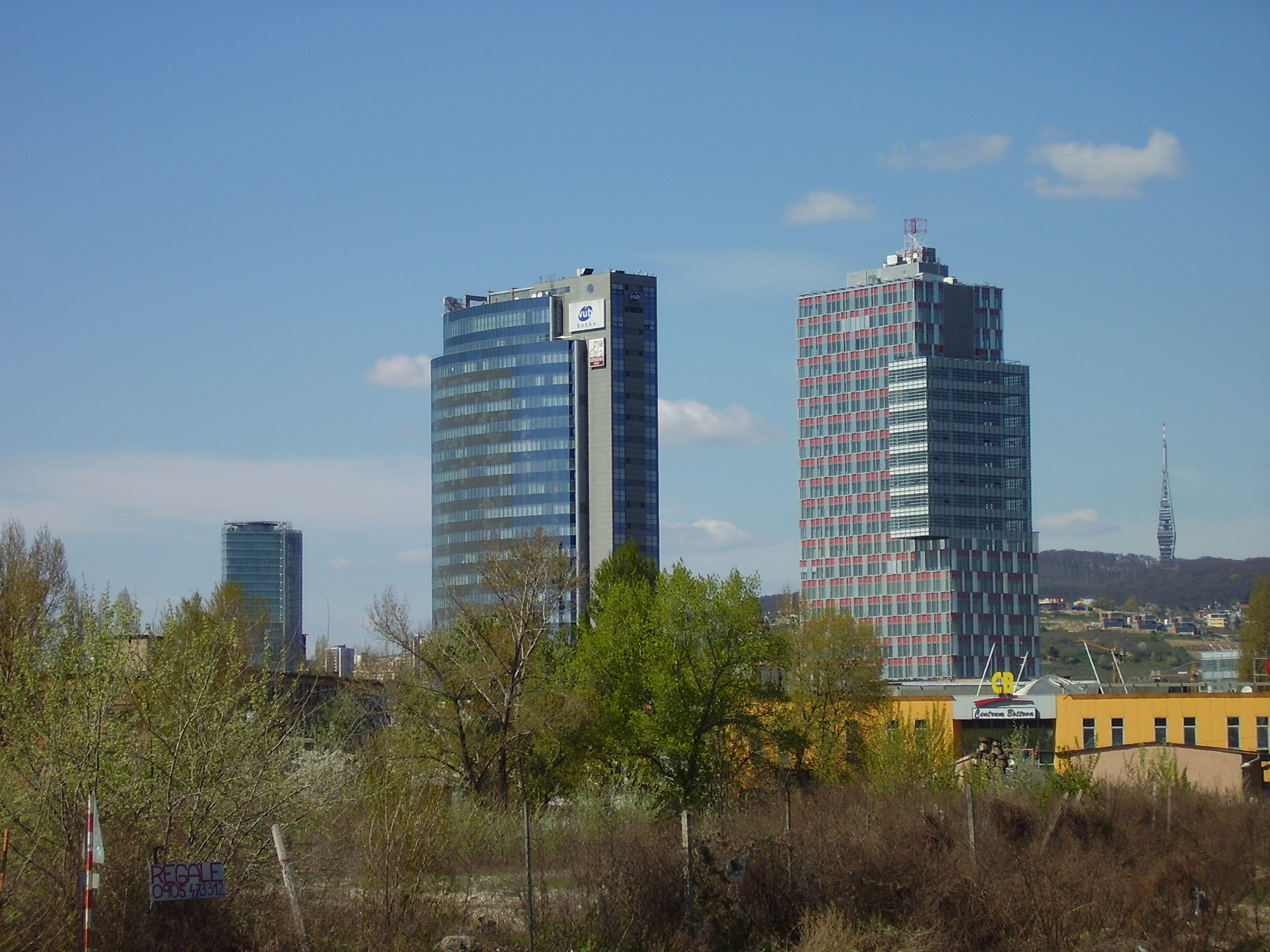 Bratislava